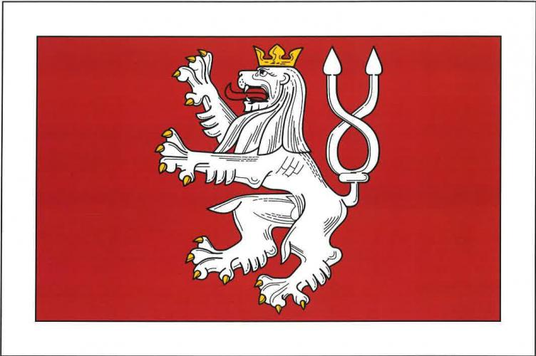 Vlajka městyse Karlštejn. Červený list s bílým lemem širokým desetinu šířky listu. V červeném poli korunovaný bílý dvouocasý lev se žlutou zbrojí. Poměr šířky k délce listu je 2 : 3.